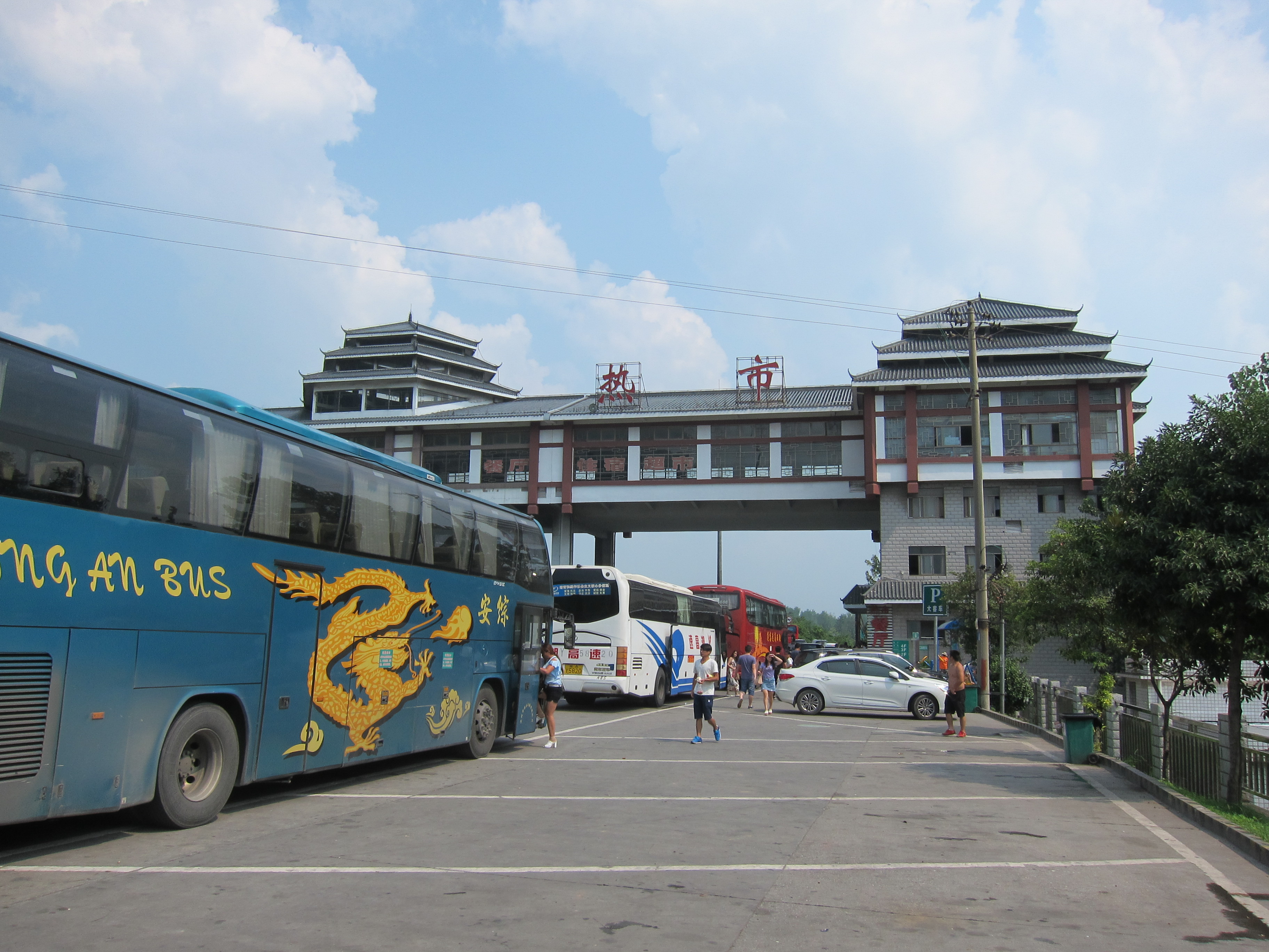 サービスエリアでの休憩。人の波に合わせて降りていれば散策できたのだろうが、出遅れてしまったのでちょっと外から眺めるだけでそそくさとバスに戻った。中国のサービスエリアでよく見かける、橋脚を渡している建物。